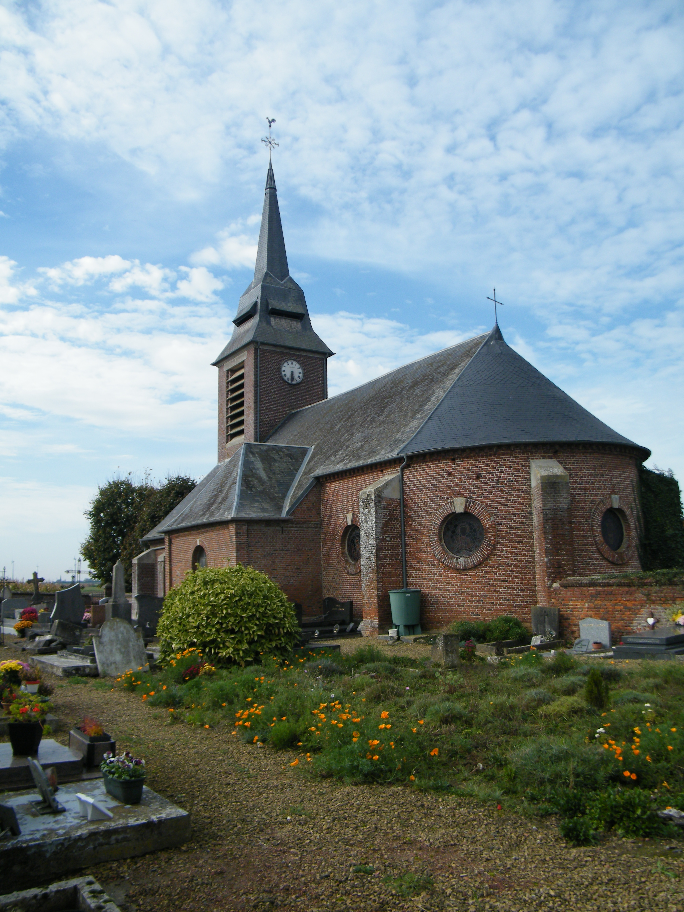 L'église Saints-Crépin-et-Crépinien.